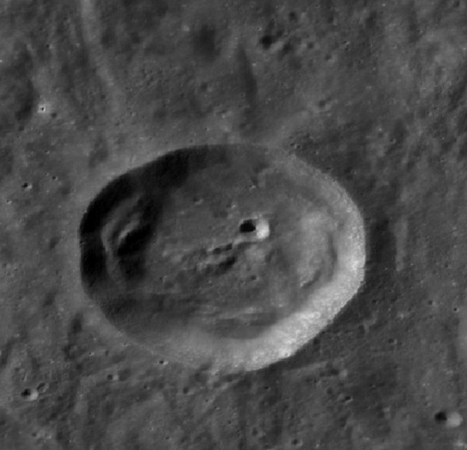 Cráter lunar Graff. (Imagen LRO)